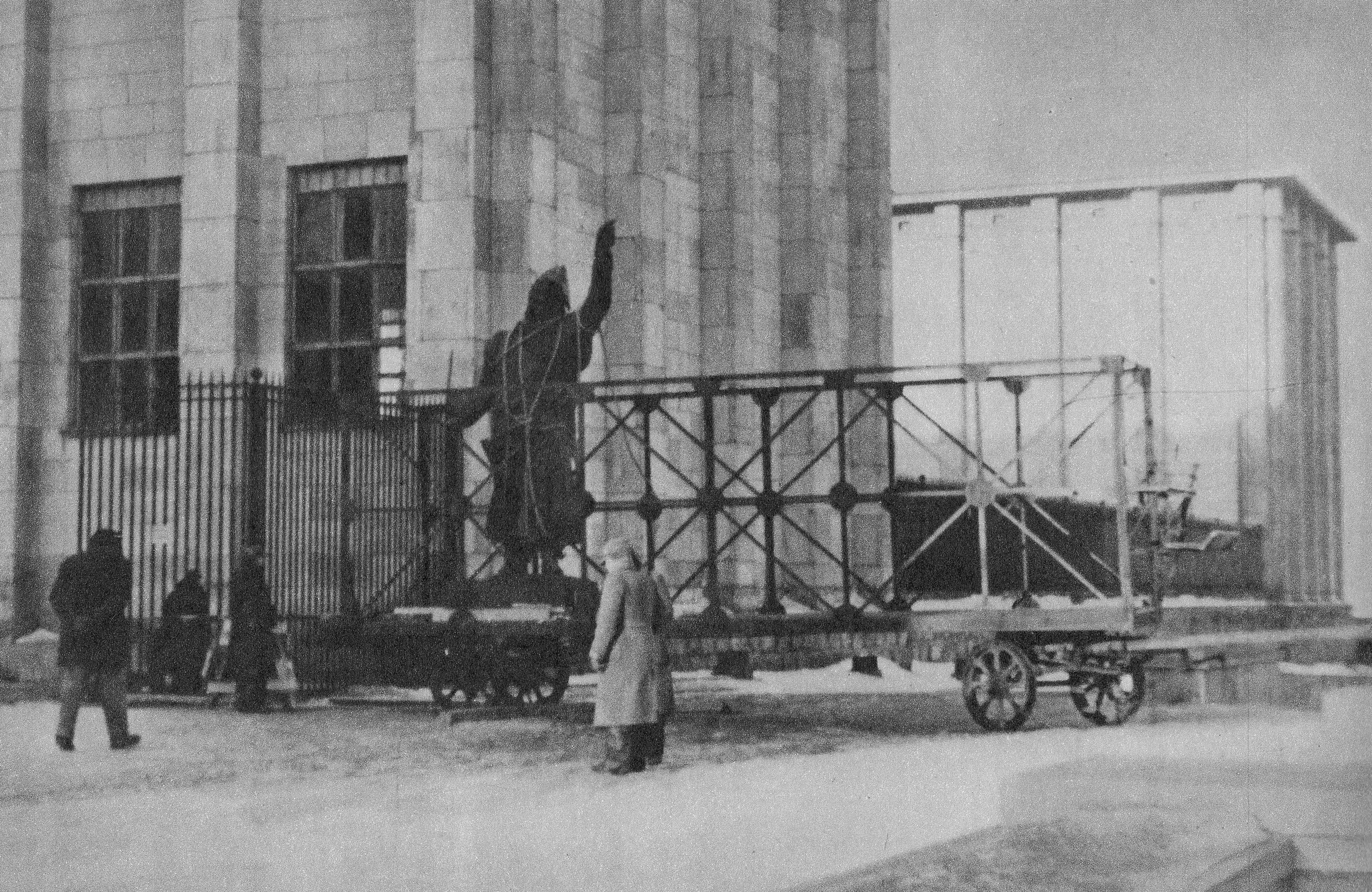 Zdemontowany pomnik Jana Kilińskiego przewieziony pod gmach Muzeum Narodowego w Warszawie